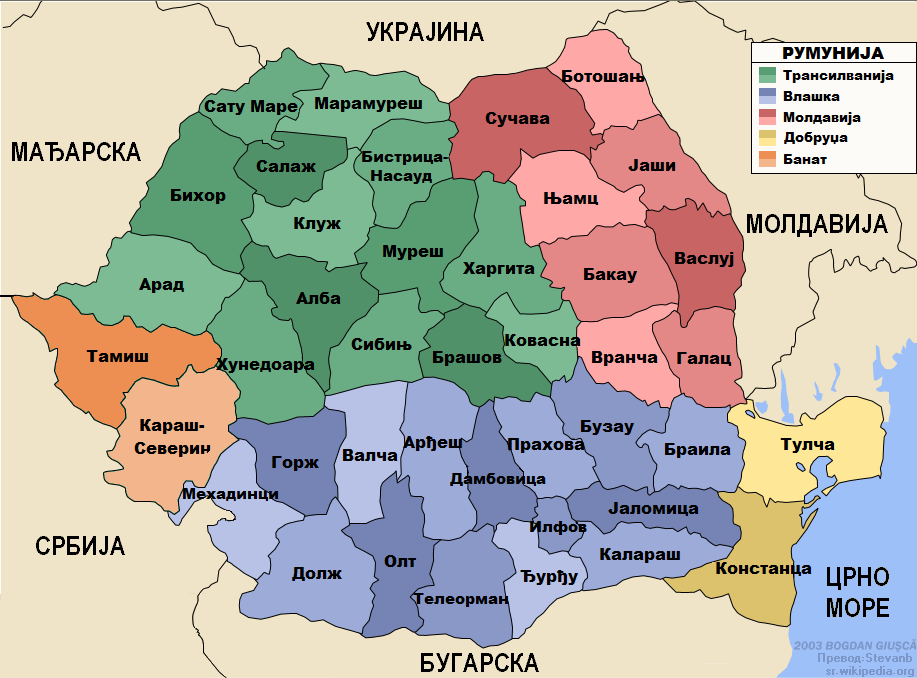 Административна подела Румуније